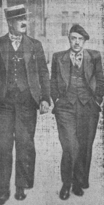 "Roger Cazy est emmené au Parquet par deux inspecteurs de la Sûreté d'Arras".